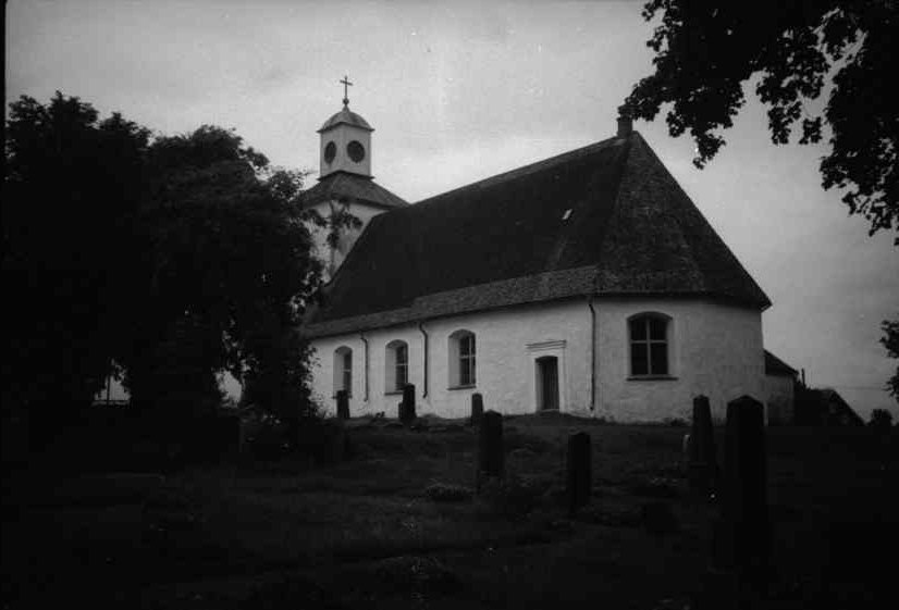 Blädinge kyrka